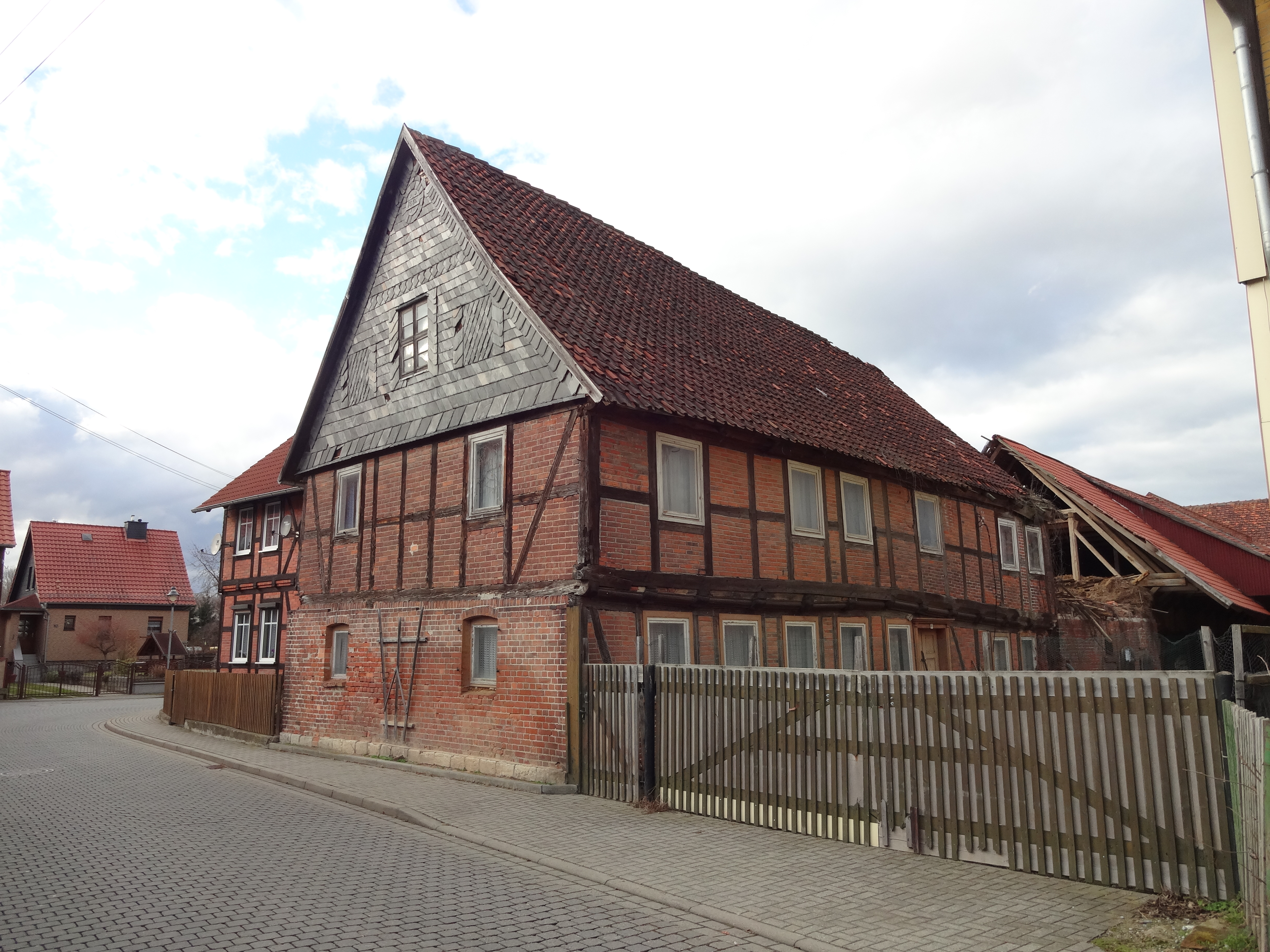 Denkmalgeschütztes Bauernhaus in der Glockengasse 6 in Silstedt, Ortsteil von Wernigerode